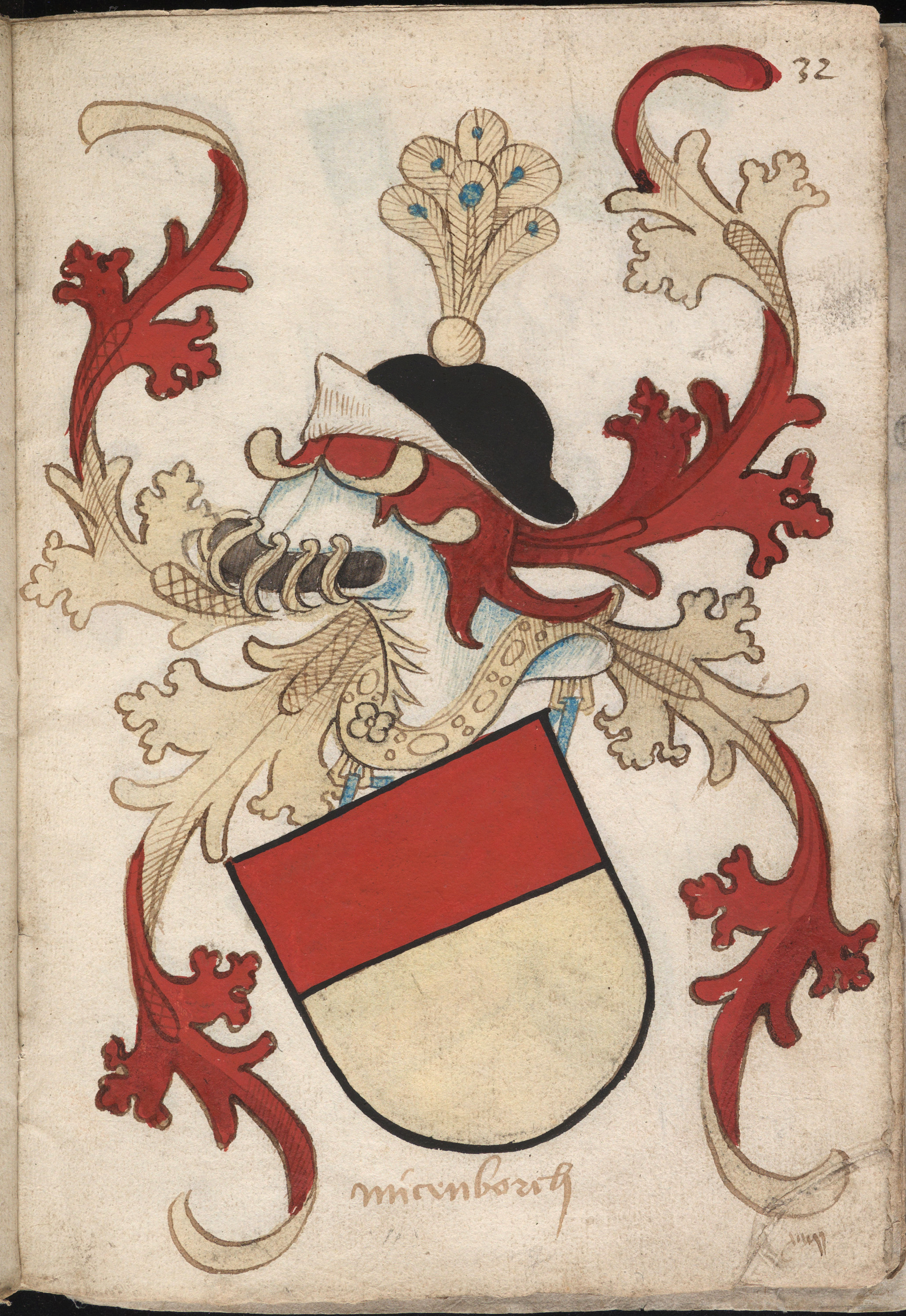 Volgens een ander wapenboek - het Wapenboek Bellenville - is dit het wapen Falkenstein. Maria van Loons grootvader Otto I van Solms-Braunfels (ca. 1322-1409) [zie fol. 29r] was getrouwd met Agnes van Falkenstein-Münzenberg (ca. 1358-1409).